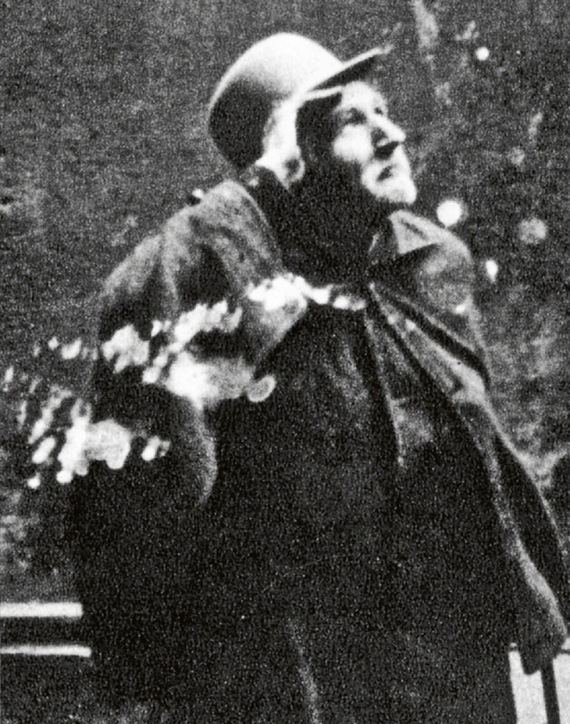 Antonín Fiala (1836-1912), český amatérský meteorolog a známý pražský excentrik